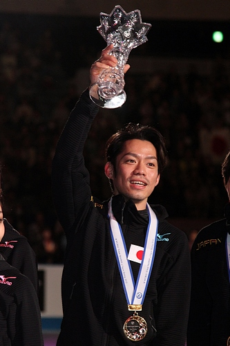 Дайсукэ Такахаси (Япония) с кубком, врученным команде-победительнице командного чемпионата мира по фигурному катанию 2012.